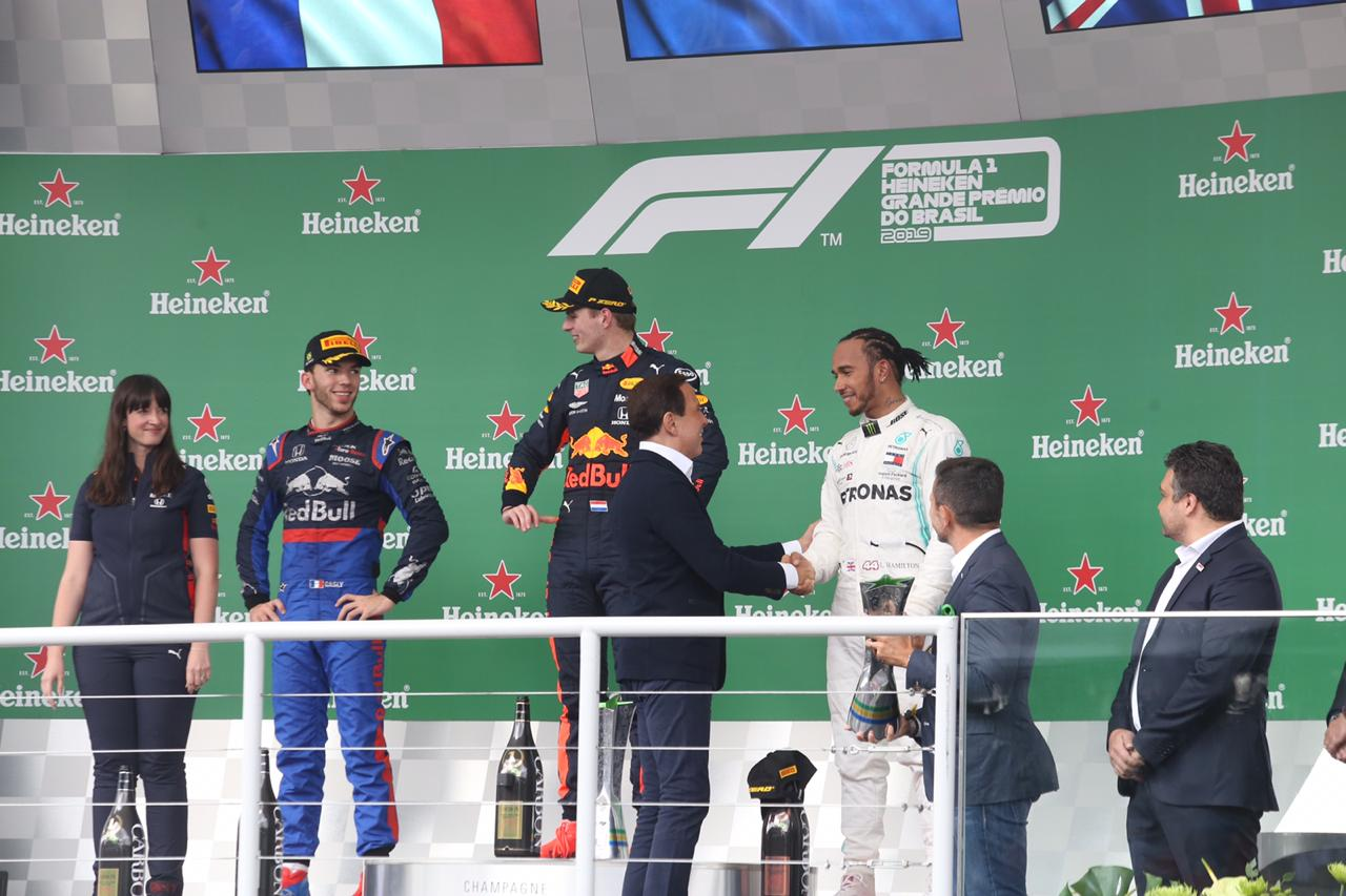 Governador do Estado de São Paulo, João Doria, durante Grande Prêmio do Brasil de F1 2019. Local: São Paulo/SP. Data: 17/11/2019